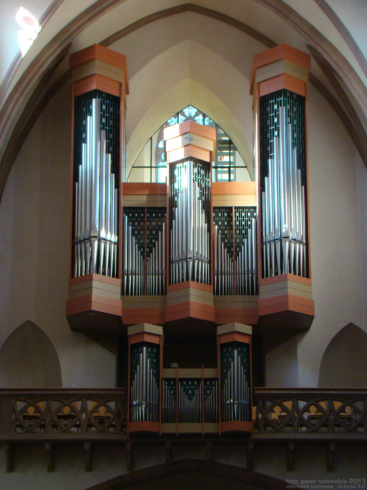 Orgel der Pfarrkirche Unserer lieben Frau in Waibstadt